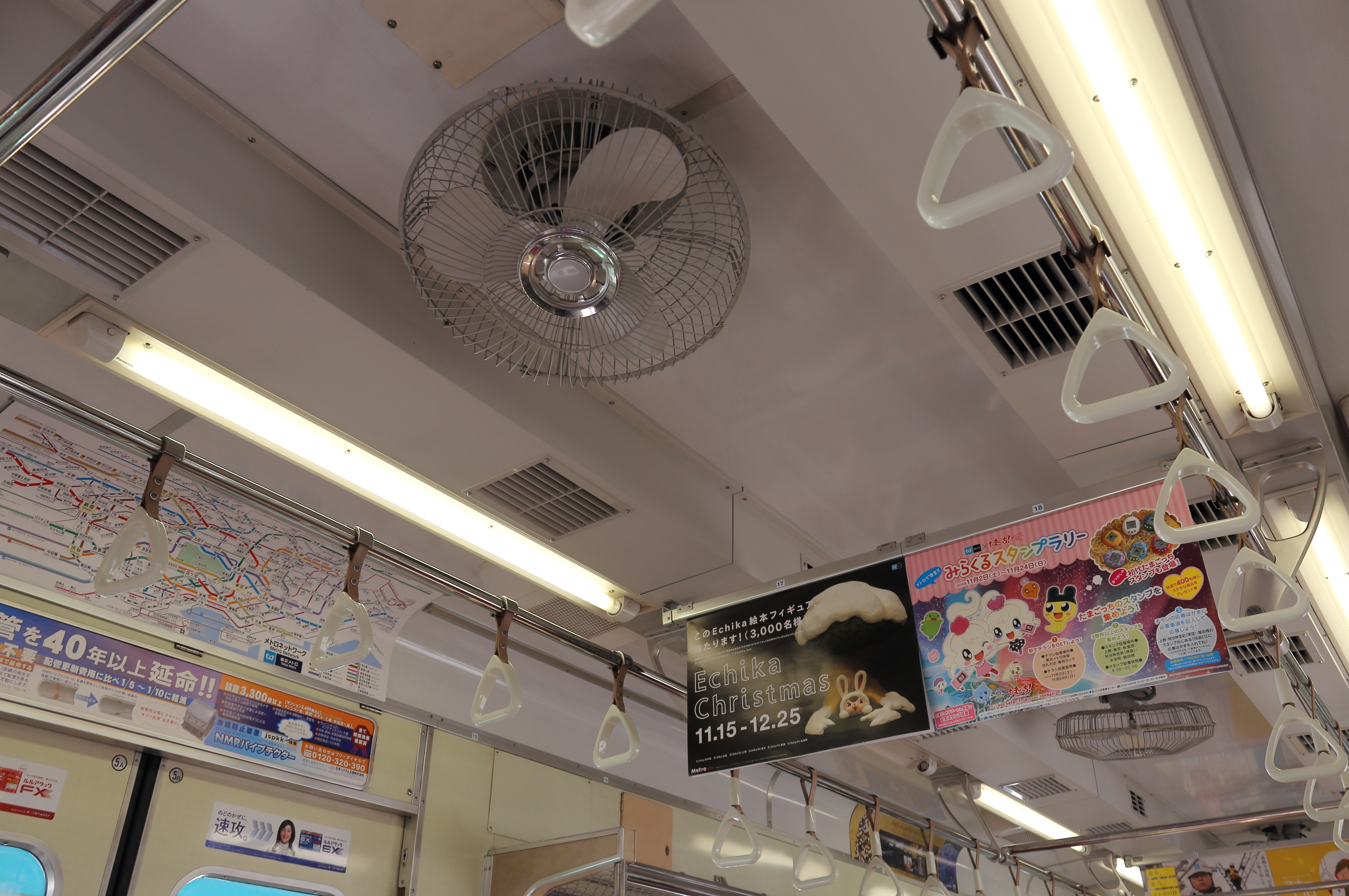 東京メトロ6000系の冷房化改造車の車内空調設備